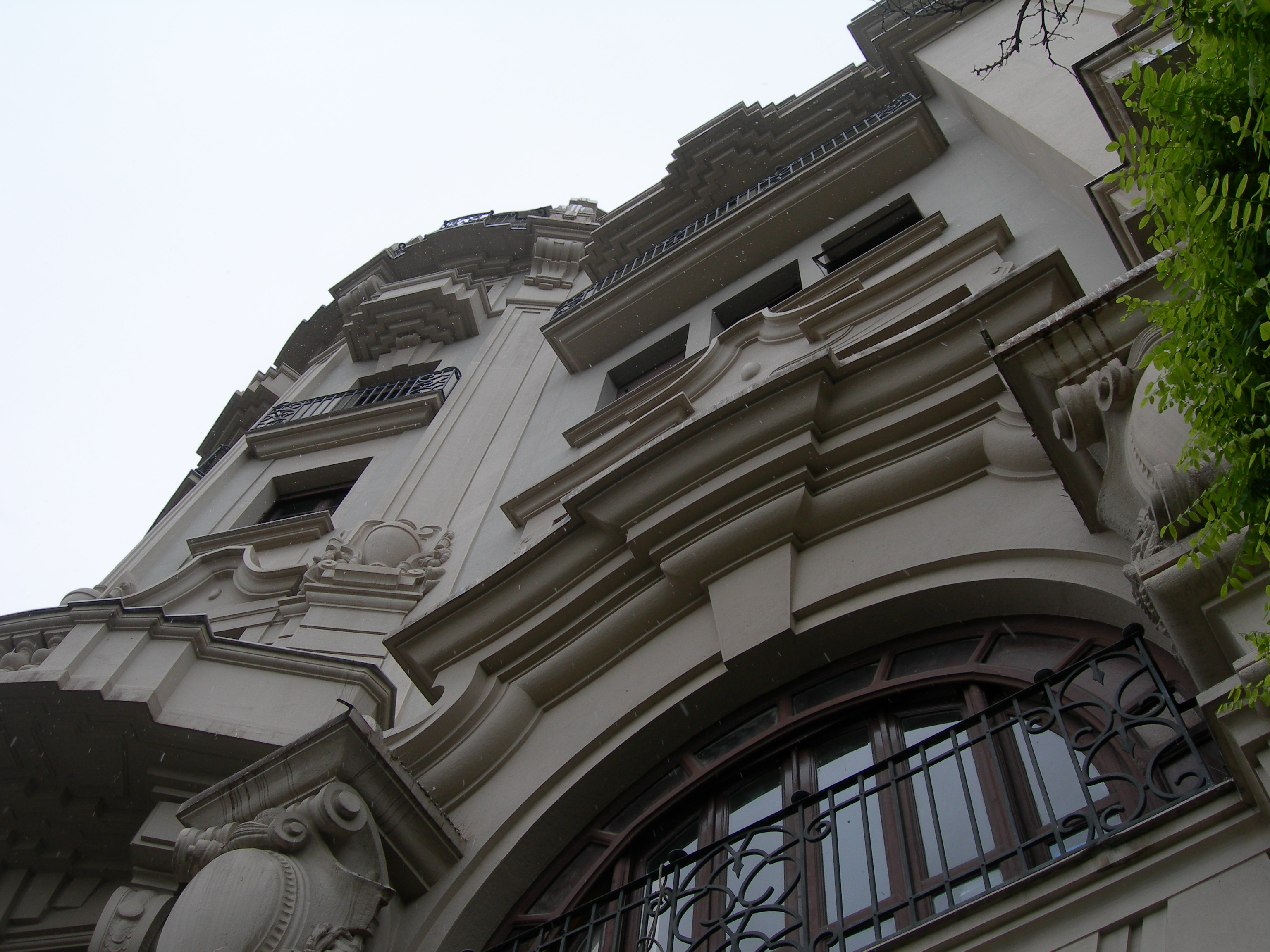 Palazzo dell'Acquedotto pugliese a Foggia